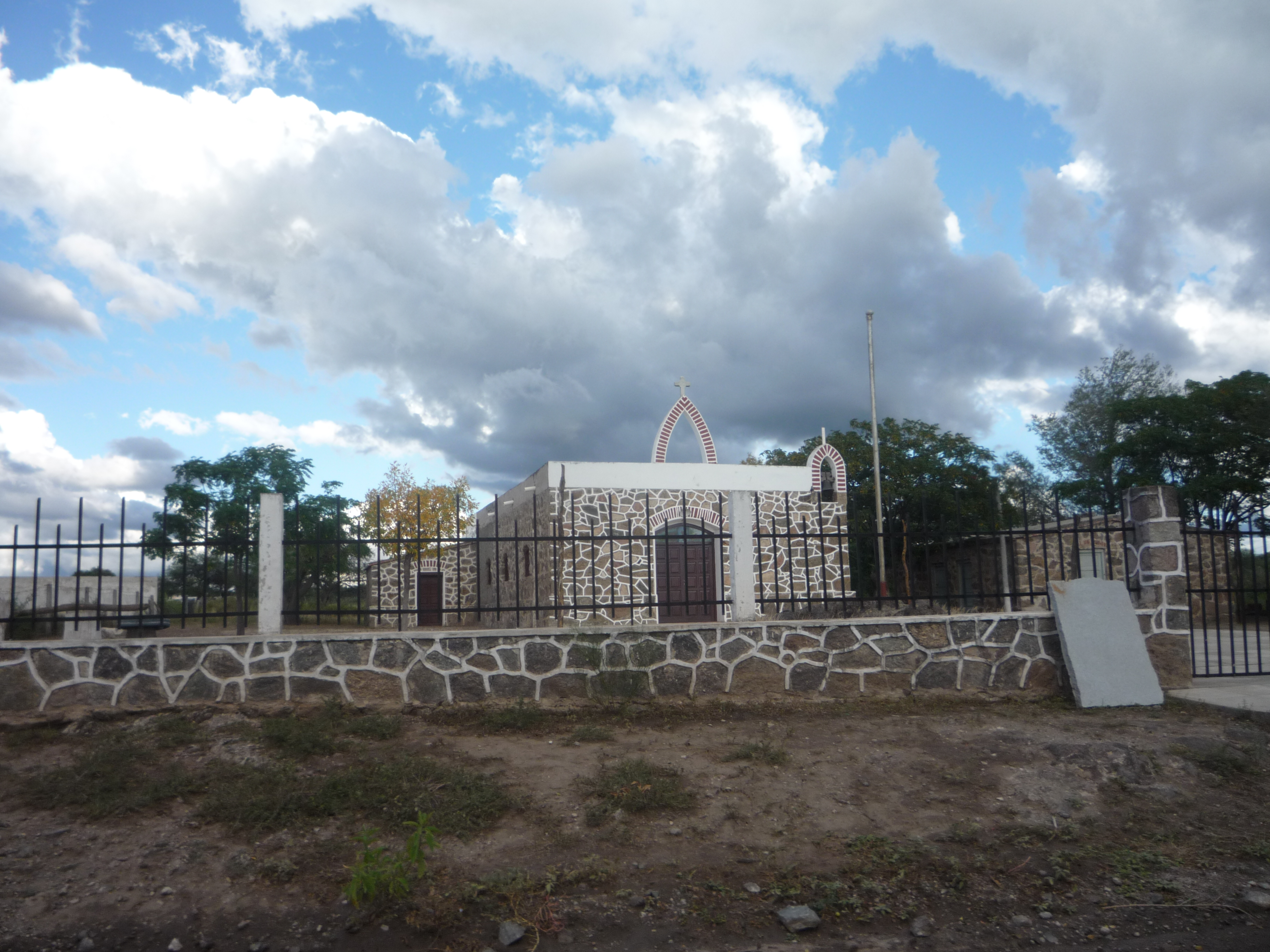 Capilla de la Virgen de Fatima